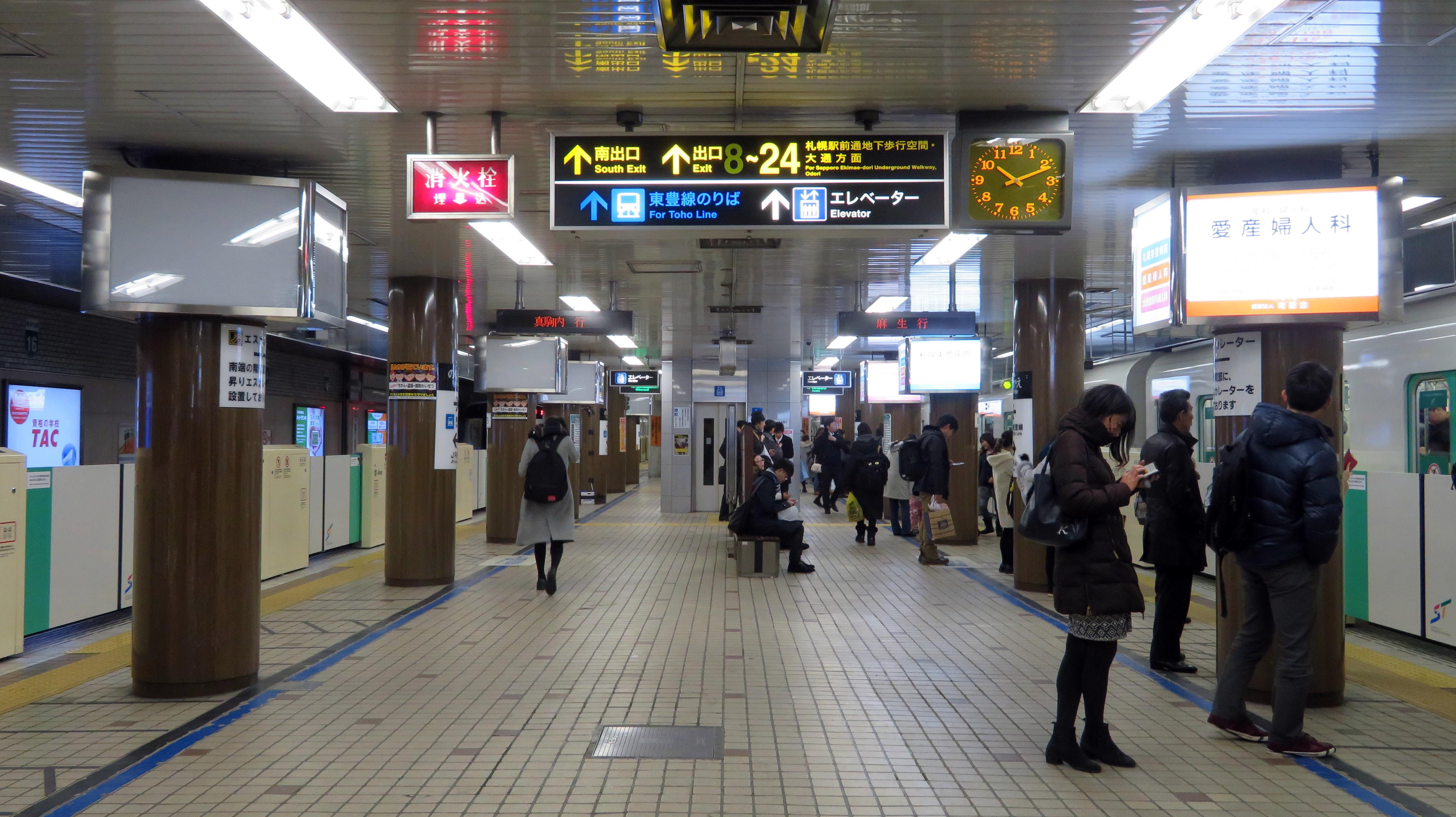 南北線さっぽろ駅ホーム